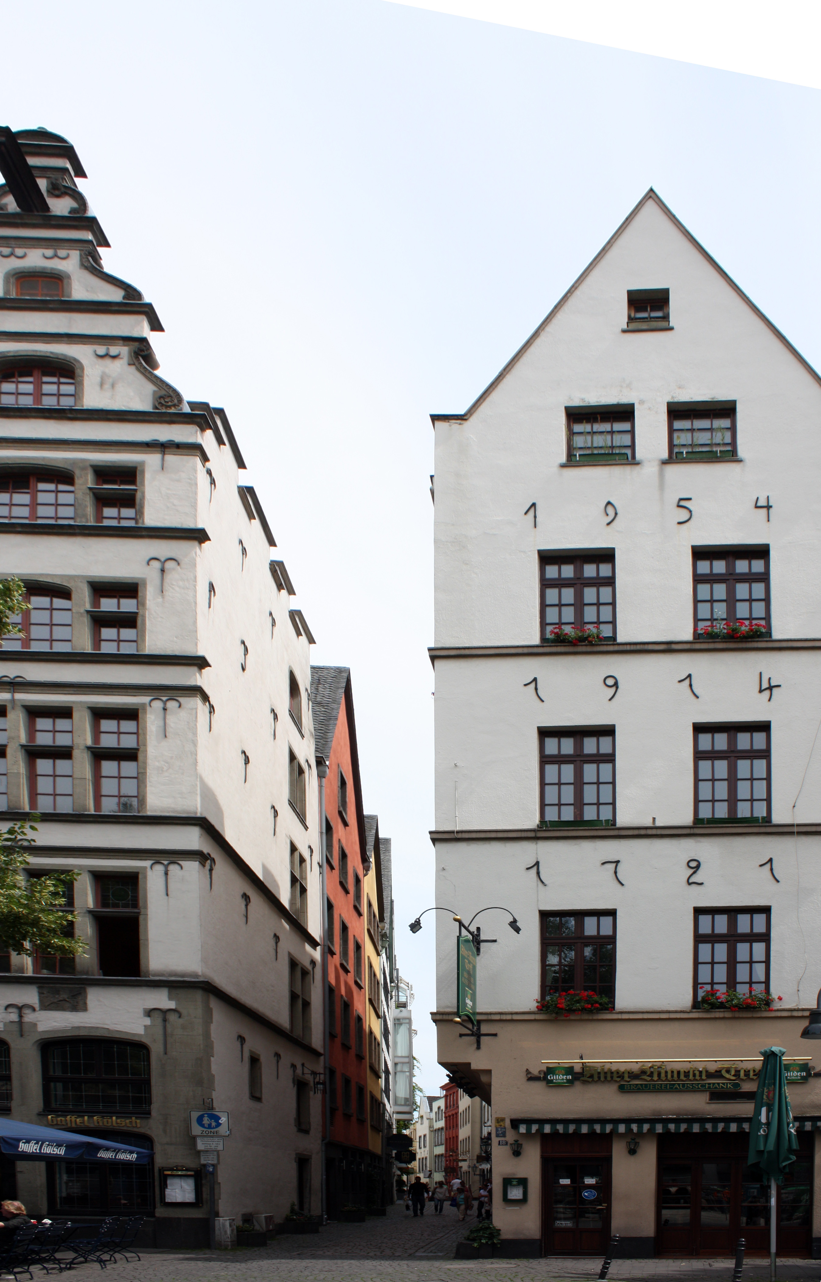 Kölner Altstadt, Eingang Lintgasse am Alter Markt - Cologne Old town, entrance to Lintgasse at Alter Markt